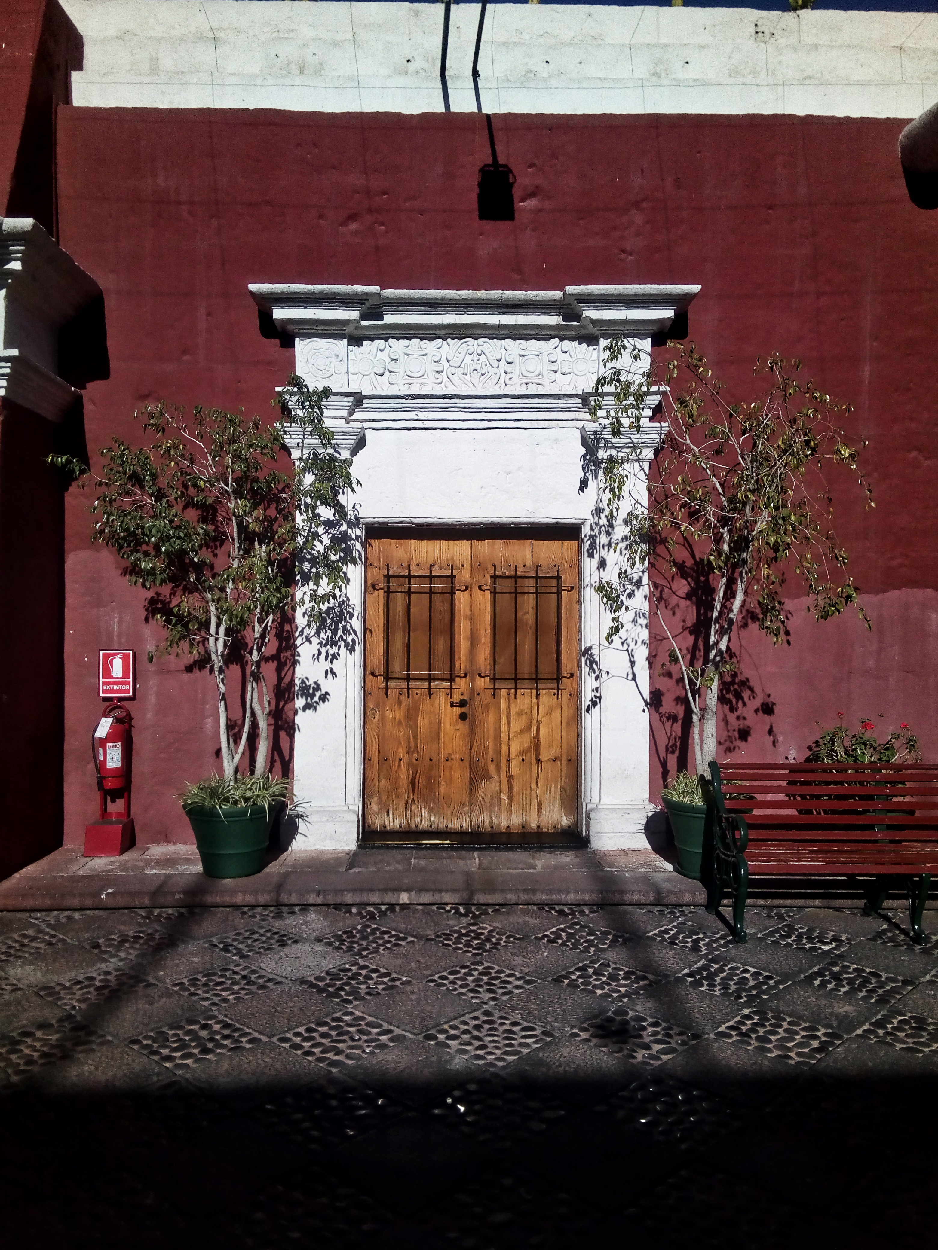 Portada del museo de Santuarios andinos, Arequipa.